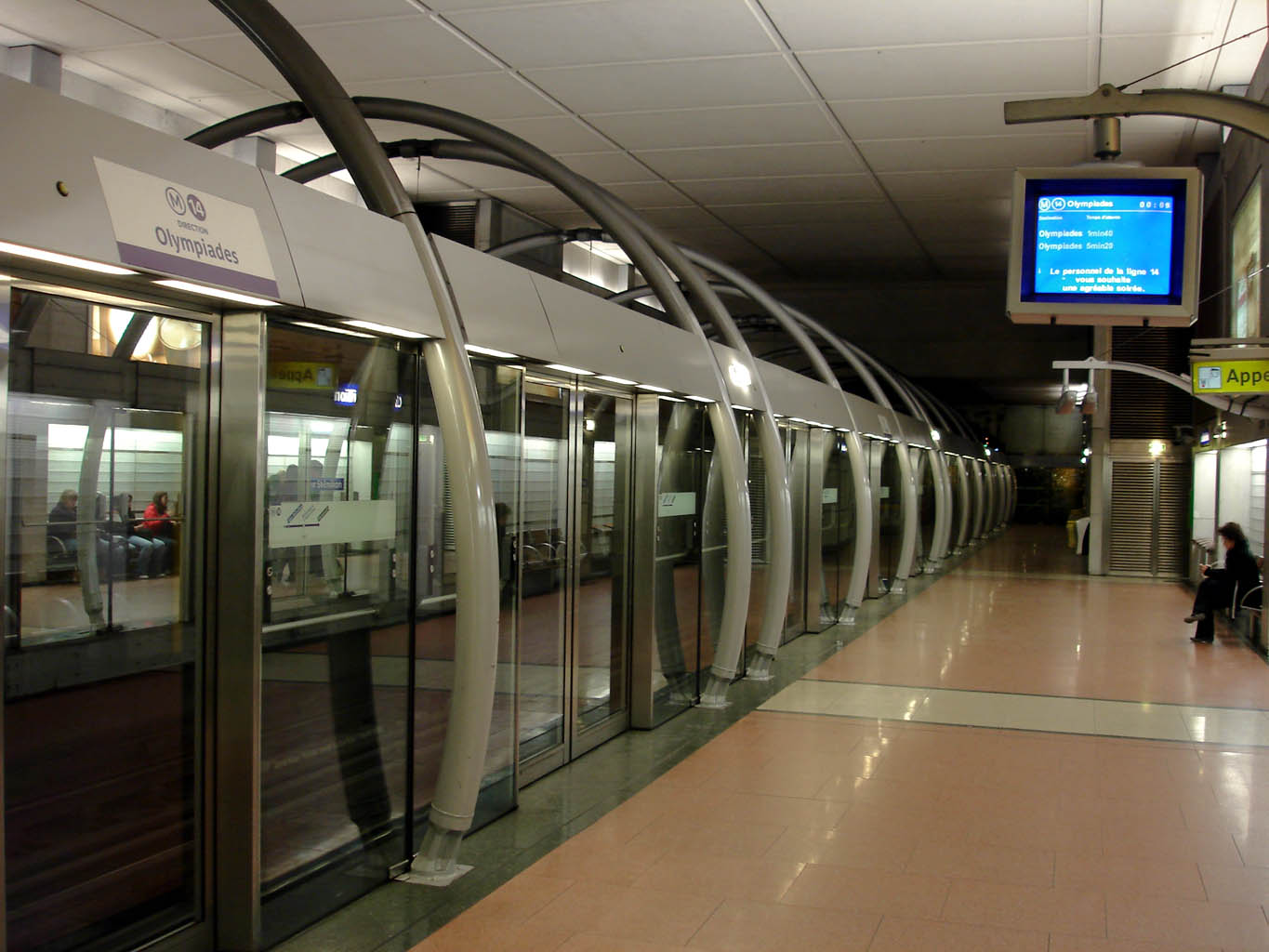 Station Cour Saint-Émilion de la ligne 14 du métro de Paris, France.